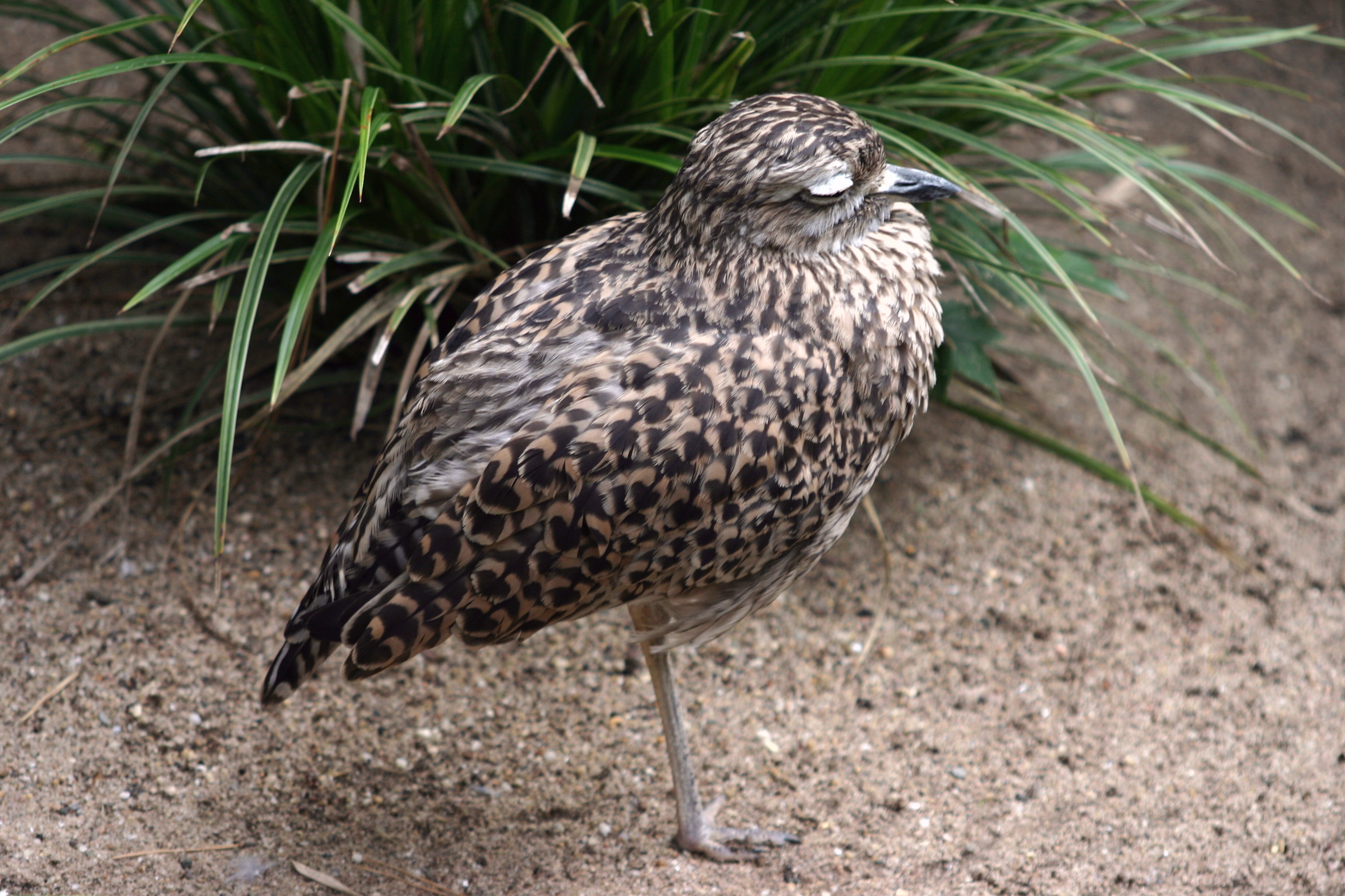 Triel